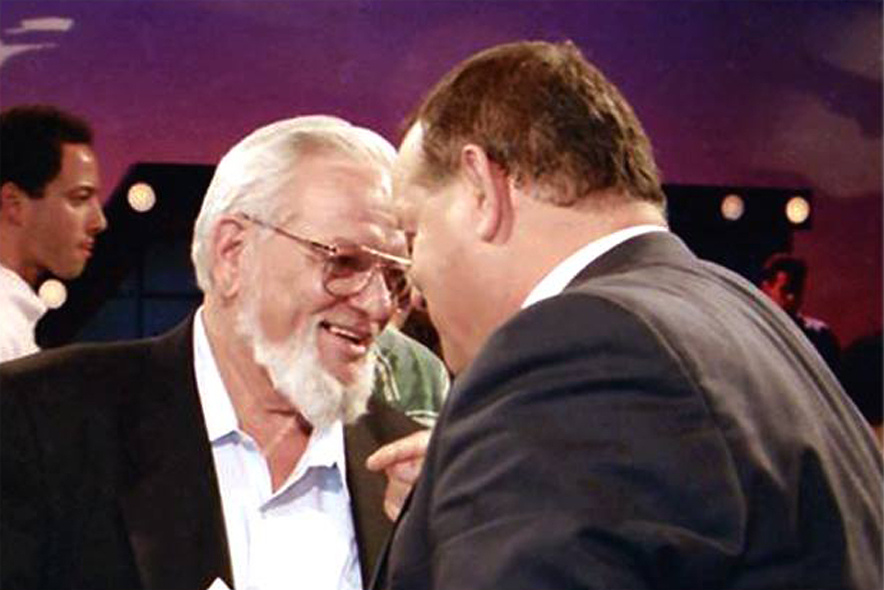 יאיר צבן ודן שילון בתכנית המעגל